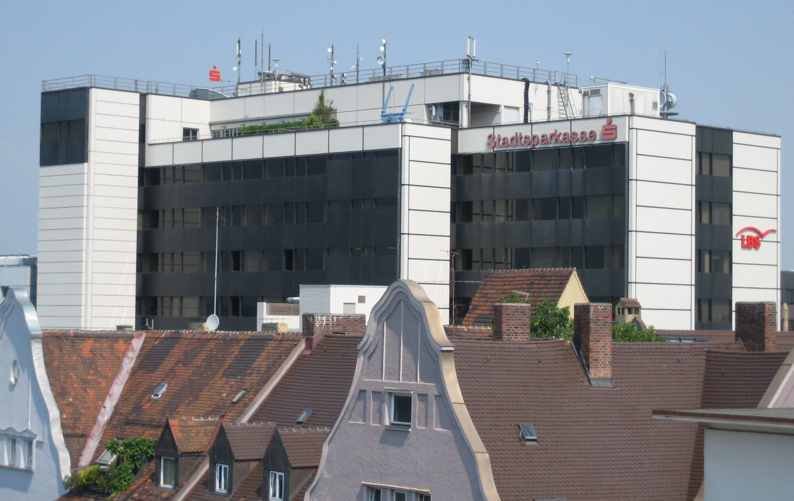 Stadtsparkasse Augsburg, Hauptstelle, aus dem Beethovenviertel gesehen